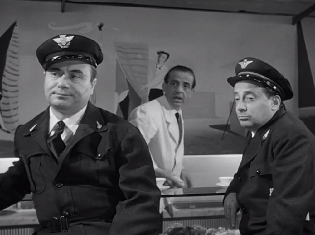 Screenshot dal film Accadde al commissariato (1954)